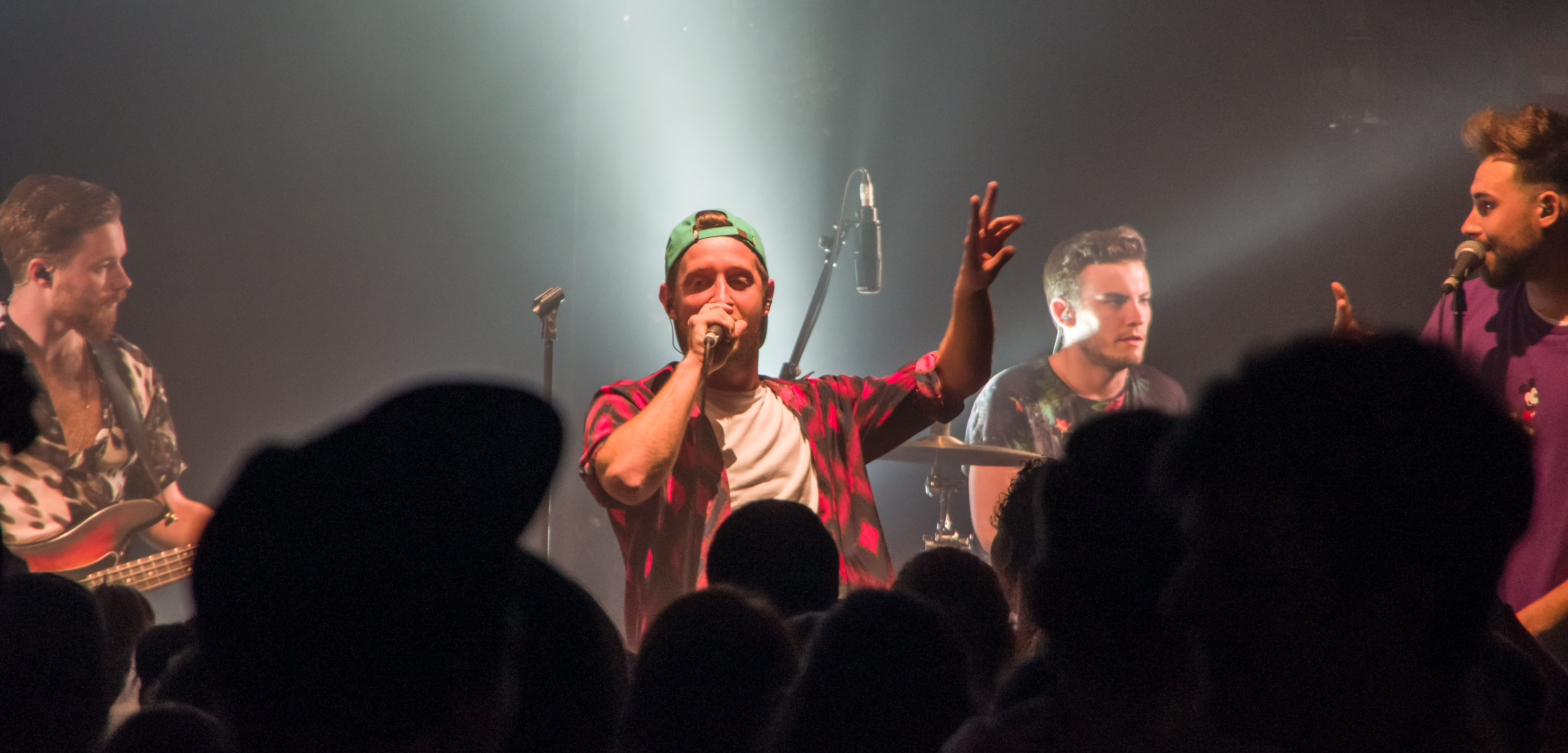 Das Zelt-Musik-Festival 2017 in Freiburg im Breisgau 12.07.2017 Teesy